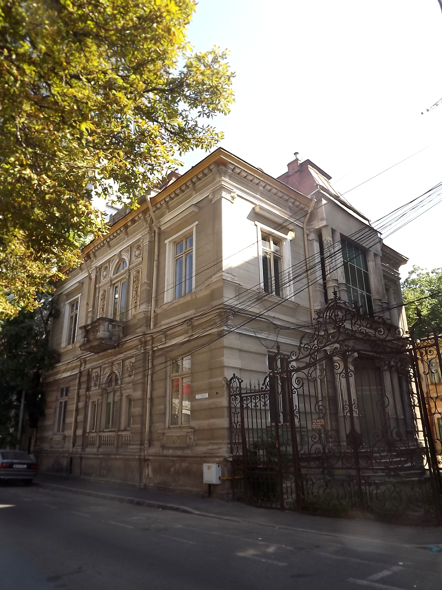 Casădrbhd